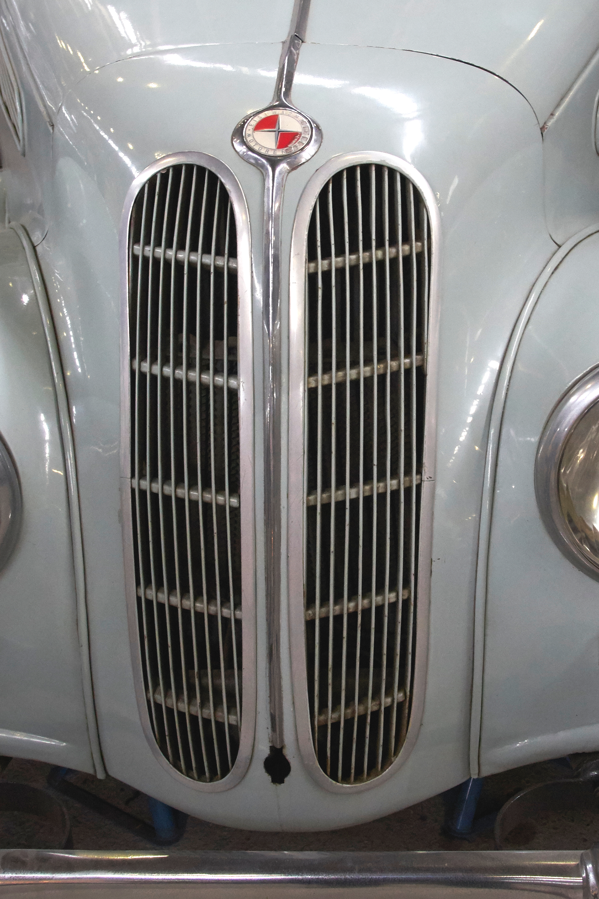 Front EMW 327 mit EMW Logo